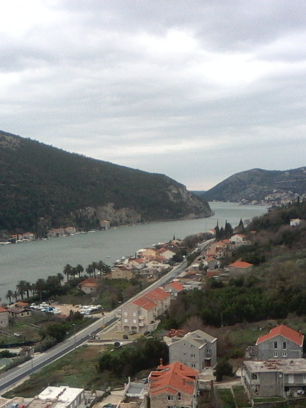 pogled na Prijevor iz Rožata, Rijeka dubrovačka